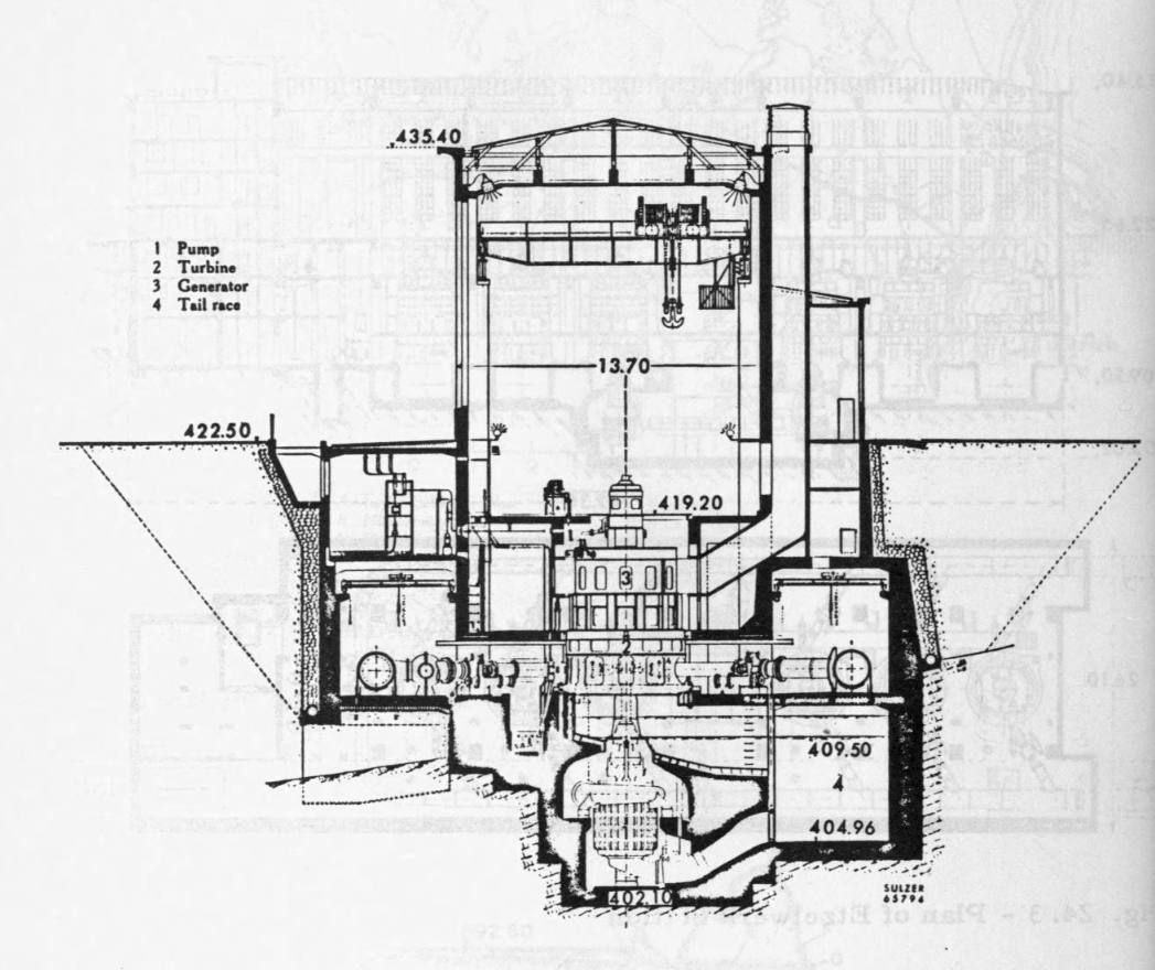 Querschnitt durch das Maschinenhaus in Altendorf. Unter der Turbine ist die Speicherpumpe sichtbar.